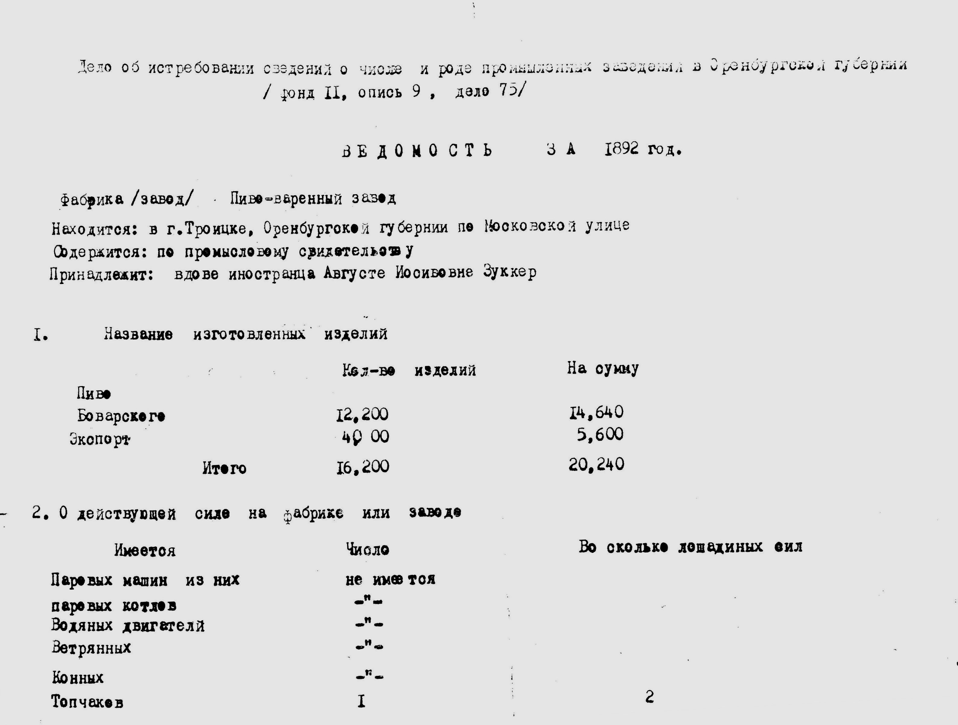 Ранее ведомости о состоянии и расходах предприятий хранились в Оренбургской губернии. Данная ведомость о Троицком пивоваренном заводе имени Зуккера.